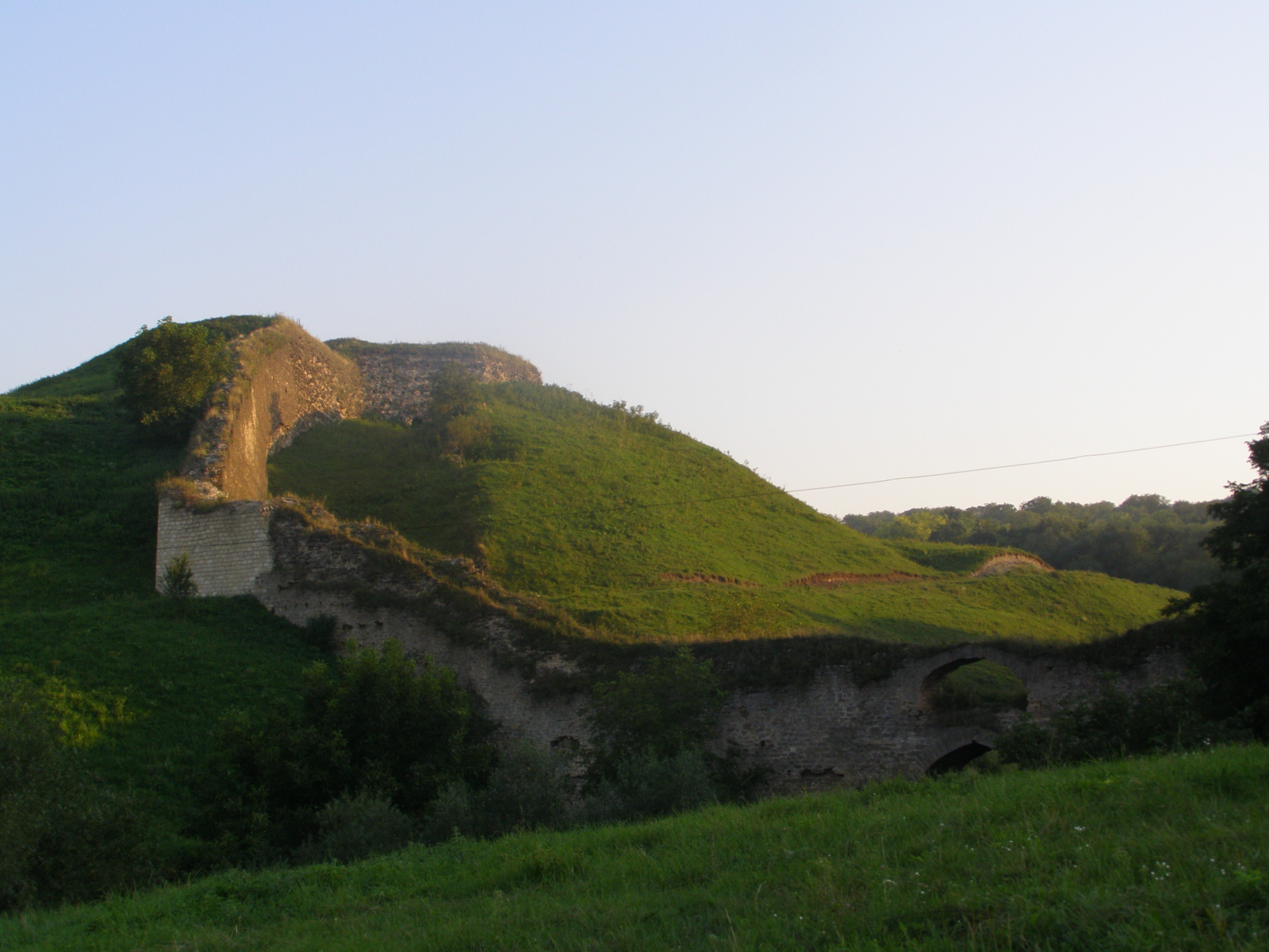 Chotyn, hradby pevnosti